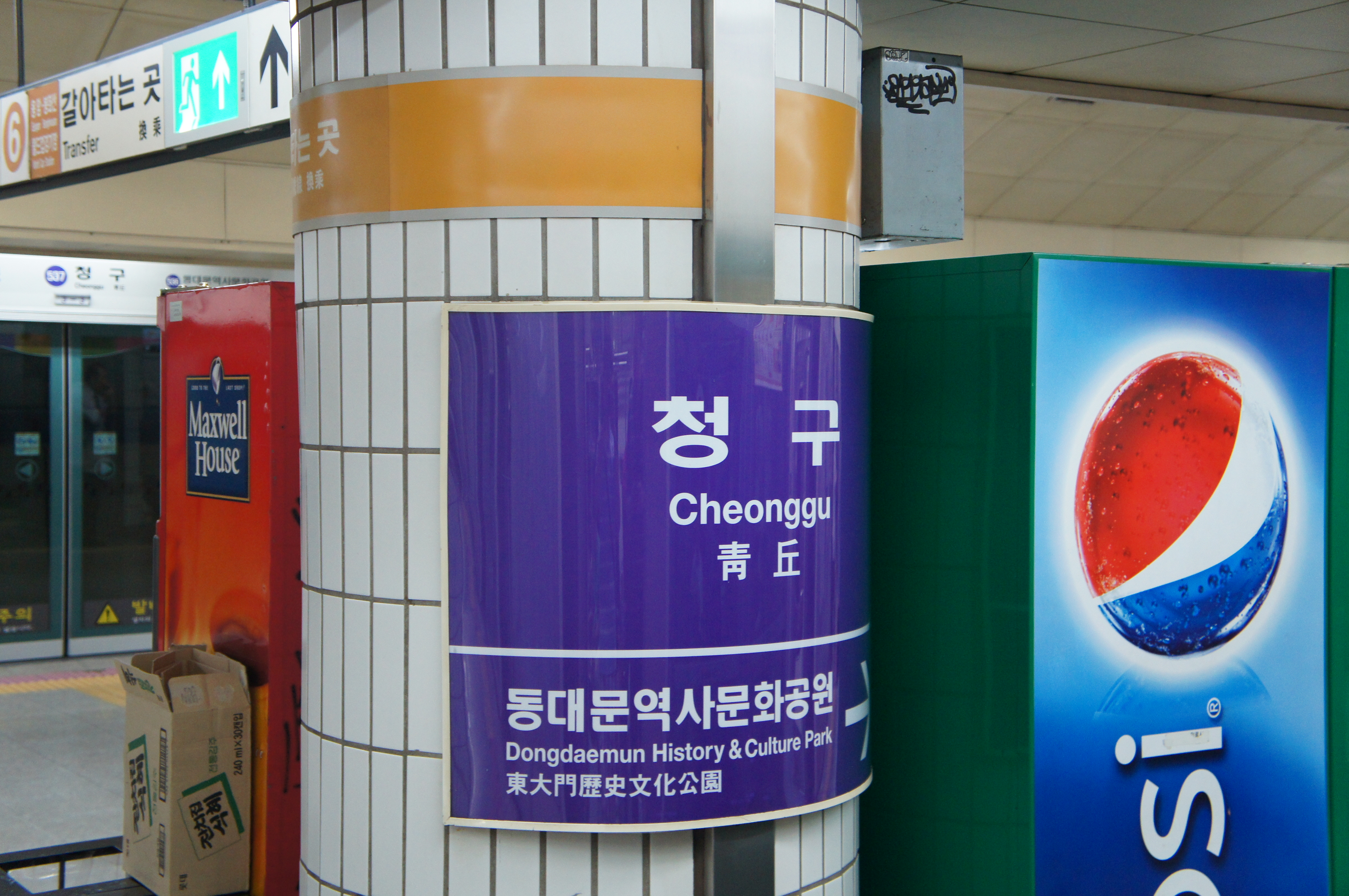 청구역 5호선 역명판